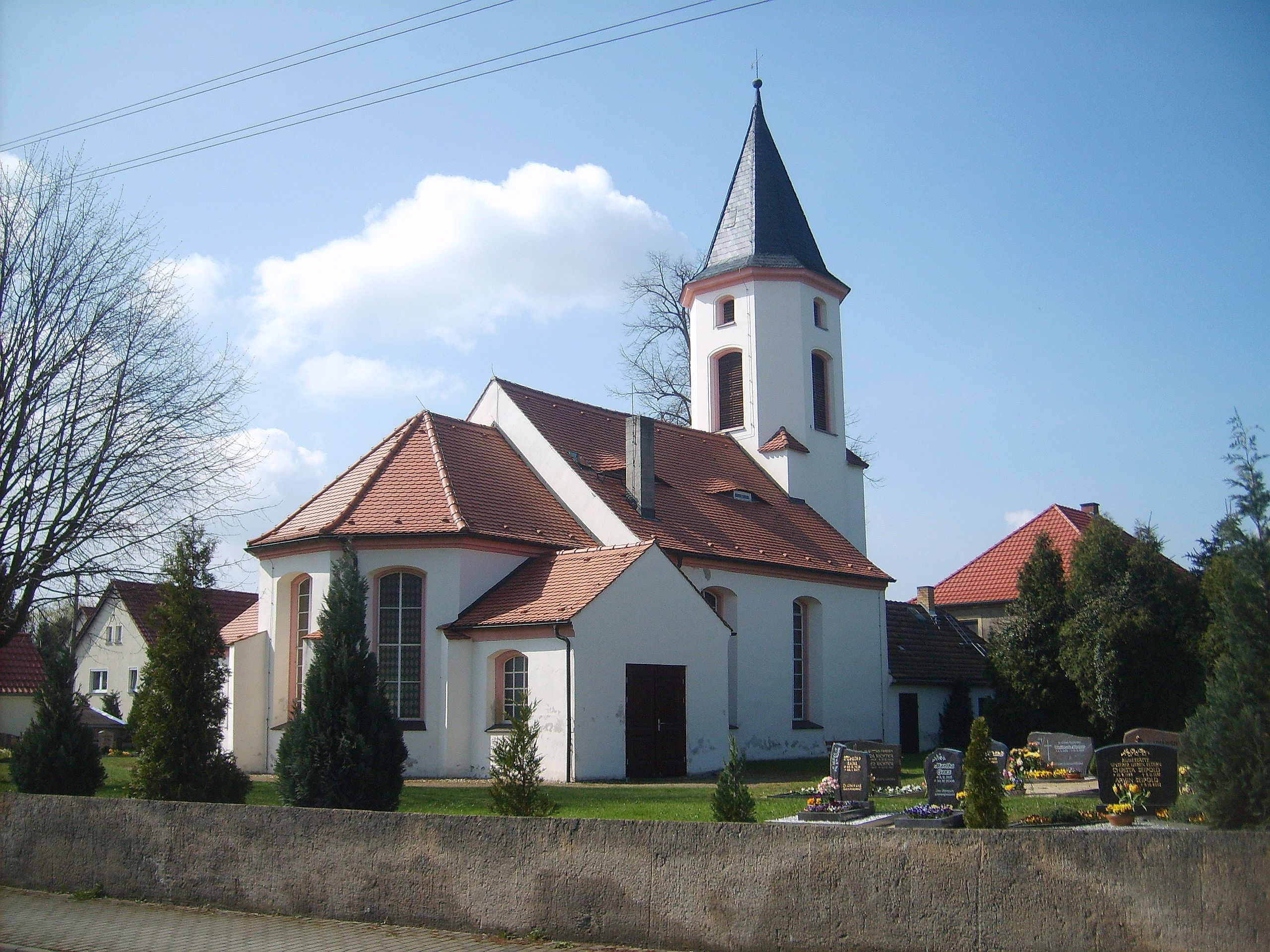 Koselitz.